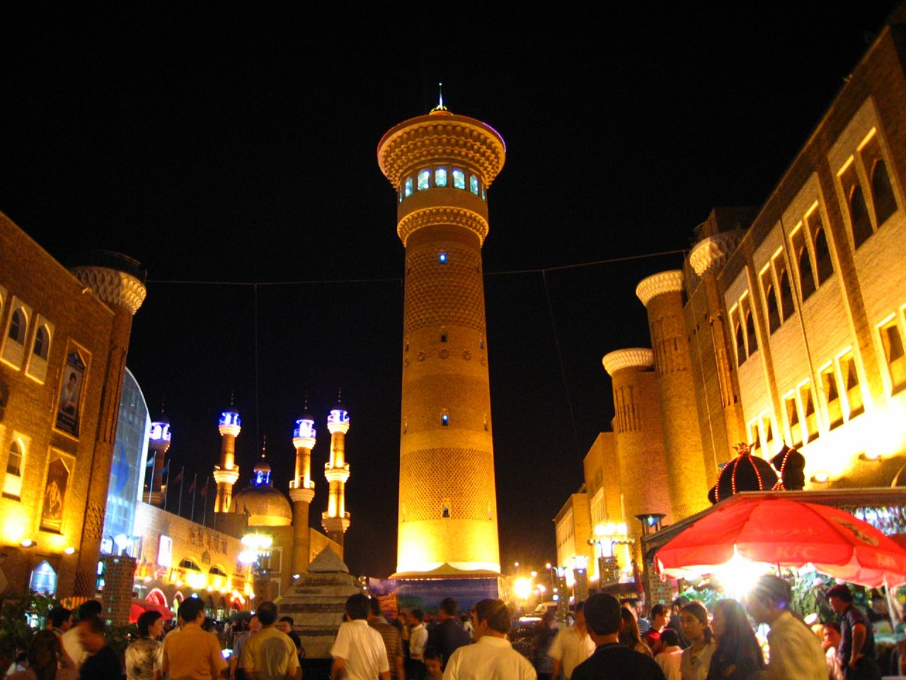 Urumqi, Xinjiang, China. Jul 05